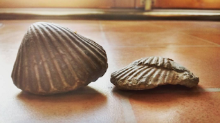 Fósiles hallados en Huertapelayo.